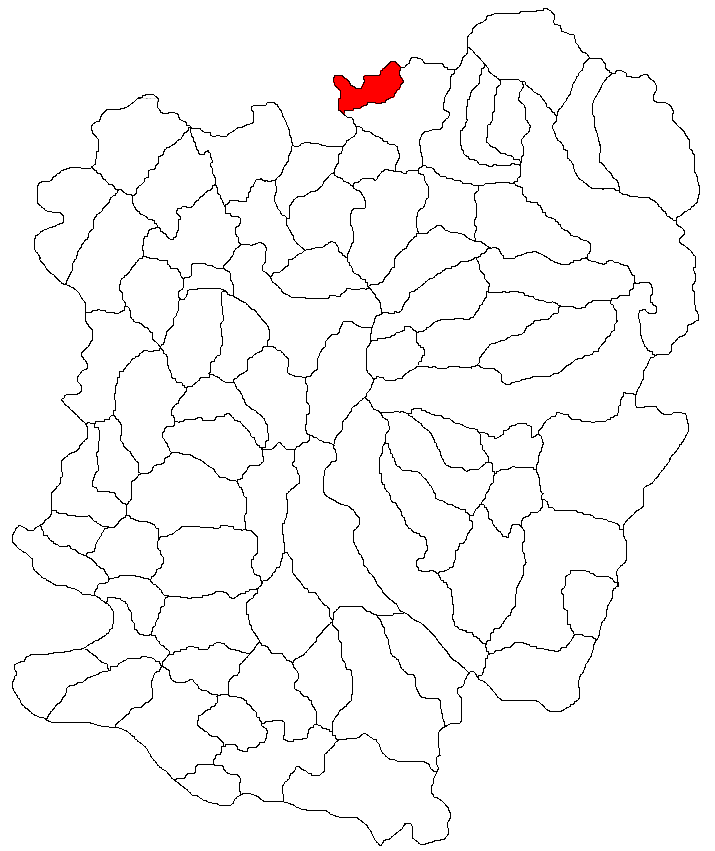 Categorie:Hărţi ale judeţului Caraş-Severin